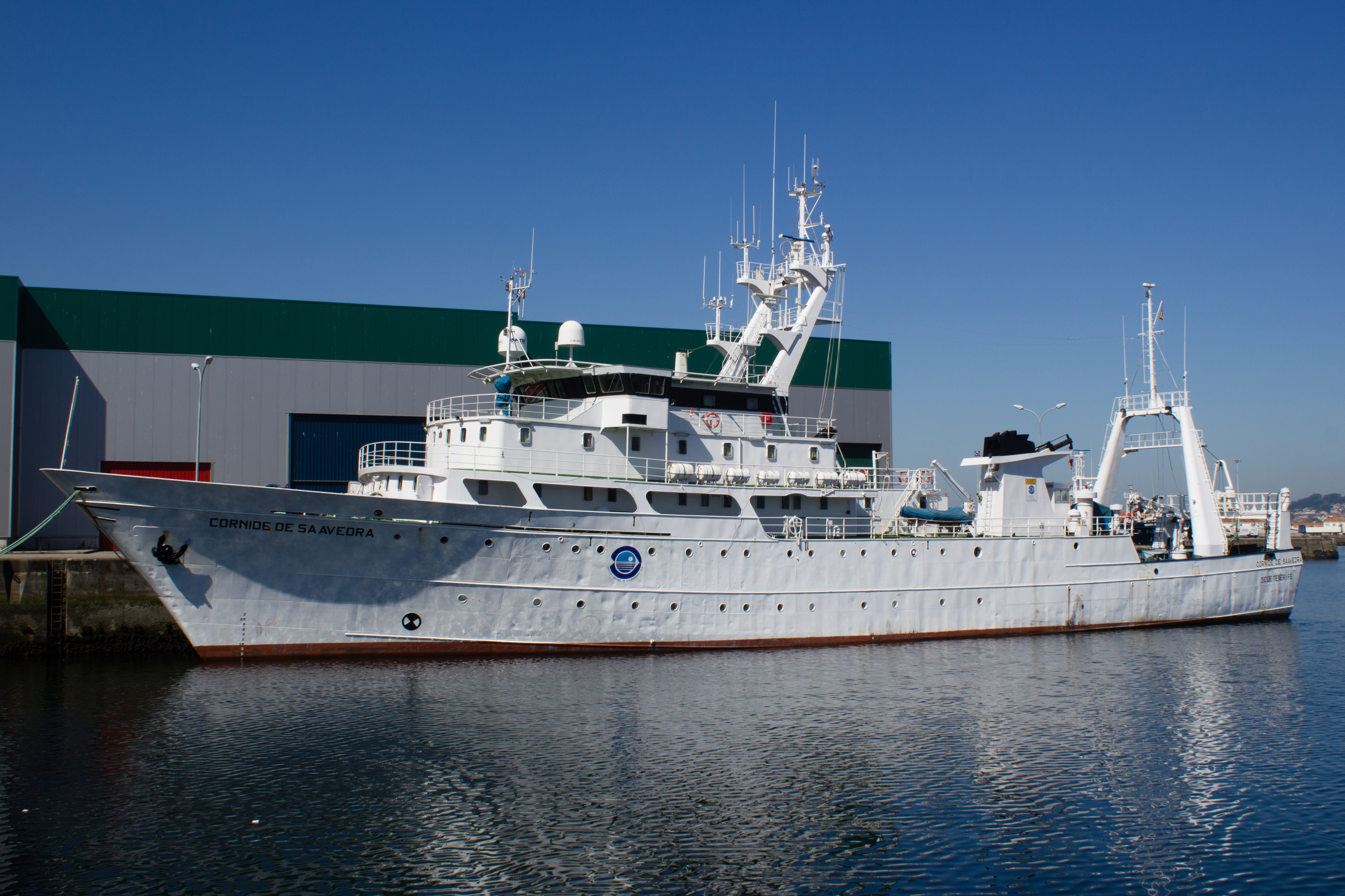 Buque oceanográfico Cornide de Saavedra no porto de Marín.